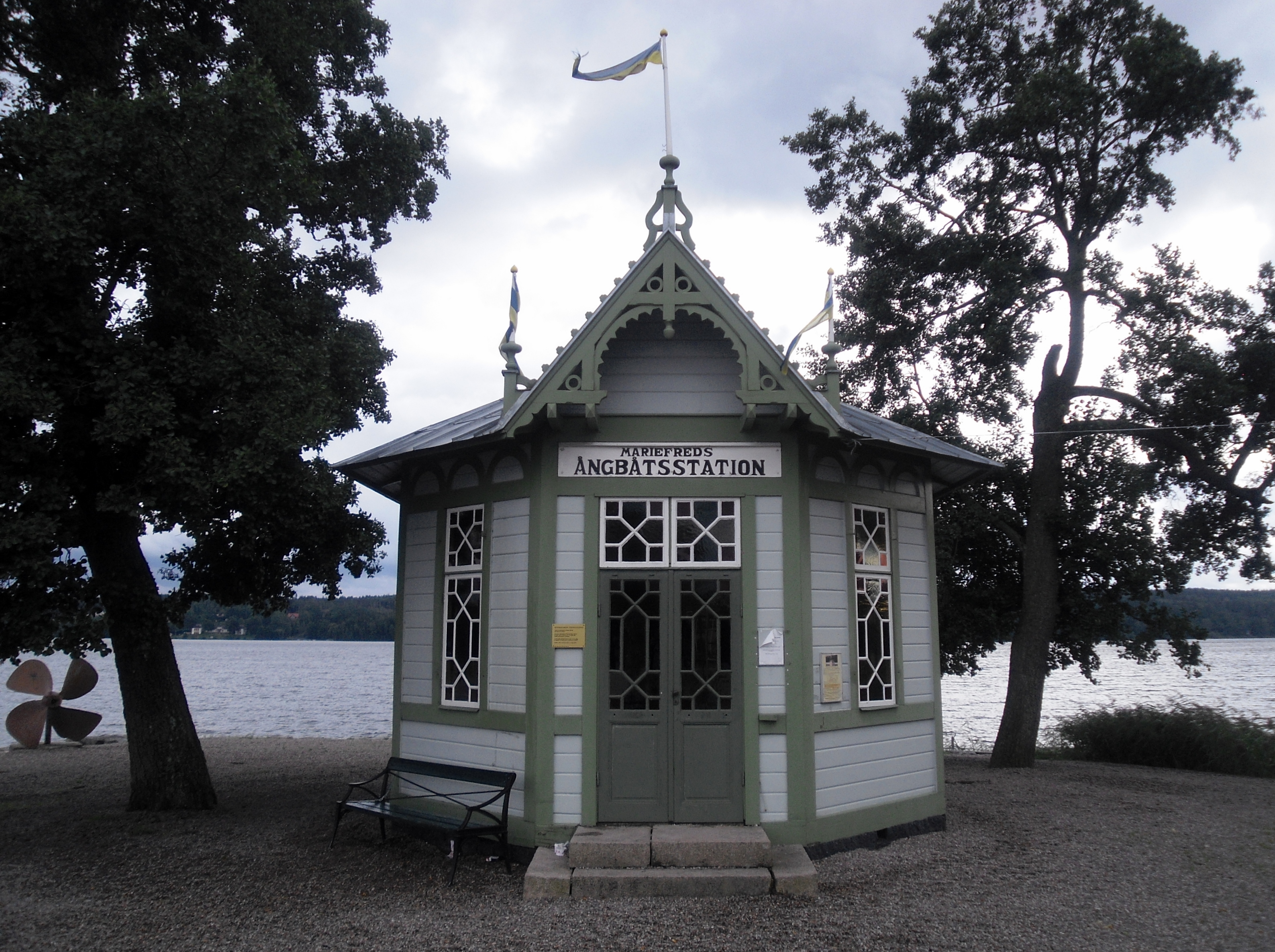 Den byggnadsminnesförklarade vänthallen (ångbåtsstationen) vi ångbåtsbyggan vid Kölnholmen i Mariefred, Södermanland, Sverige. Byggd 1888.